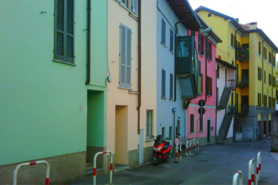 Autore: Utente:Agnellino Fonte: opera propria Descrizione: Scorcio di via Malpensata a Lecco